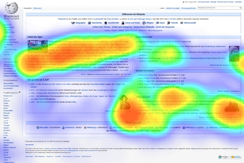 Heatmap Darstellung von Eye-Tracking-Daten auf der Wikipedia Startseite.